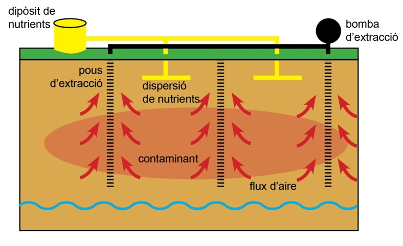 Bioventing